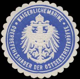 Sealing stamp Title: K. Marine Oberbefehlshaber der Ostseestreitkräfte Description: Place: size: 4 cm